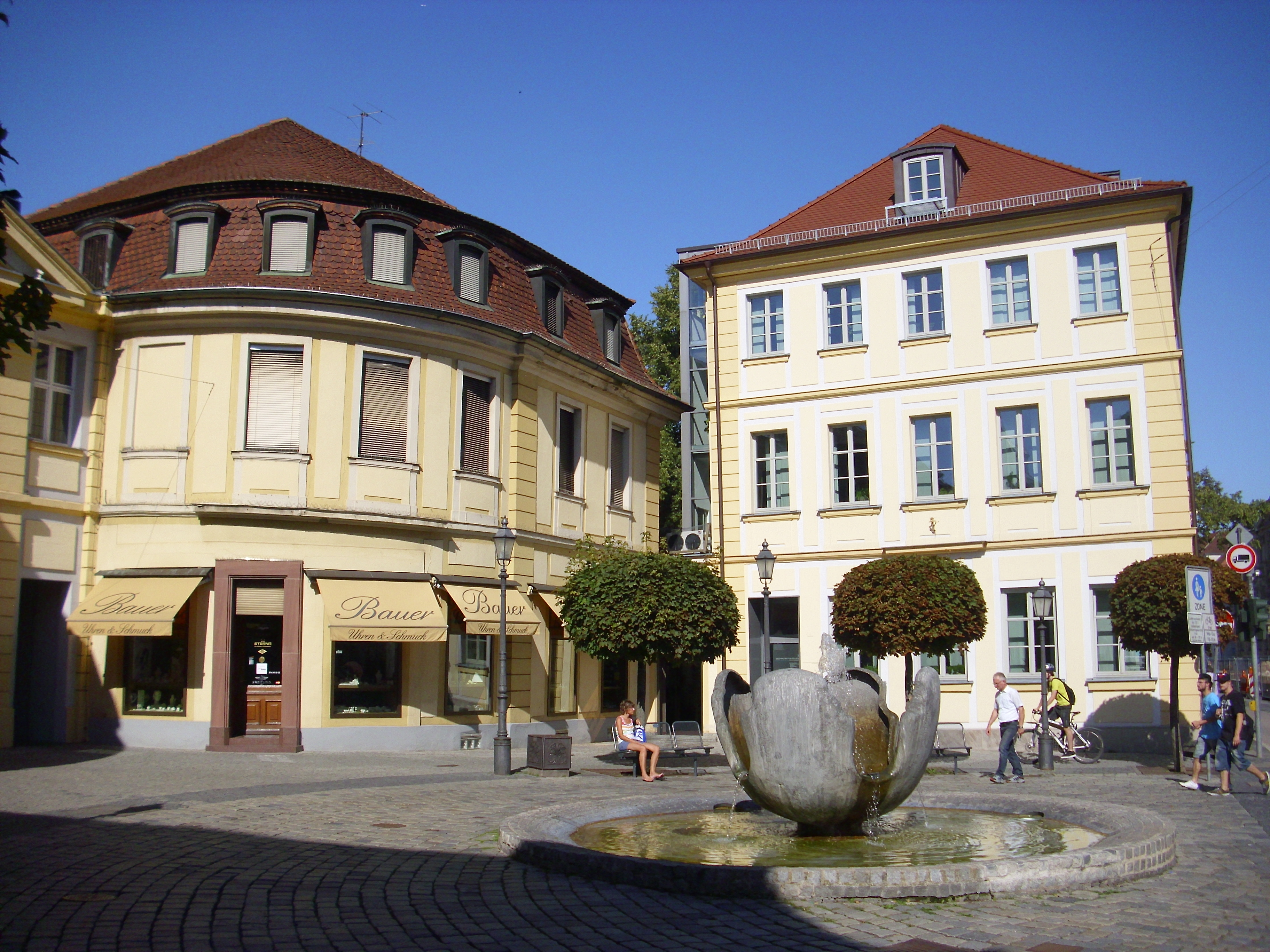 Das Herrieder Tor liegt im Süden der Ansbacher Altstadt an der Kreuzung von Uzstraße, Promenade, Maximilianstraße und Schalkhäuser Straße. Im Vordergrund: Tulpen-Brunnen von Josef Gollwitzer, Bronze, 1979 erbaut.